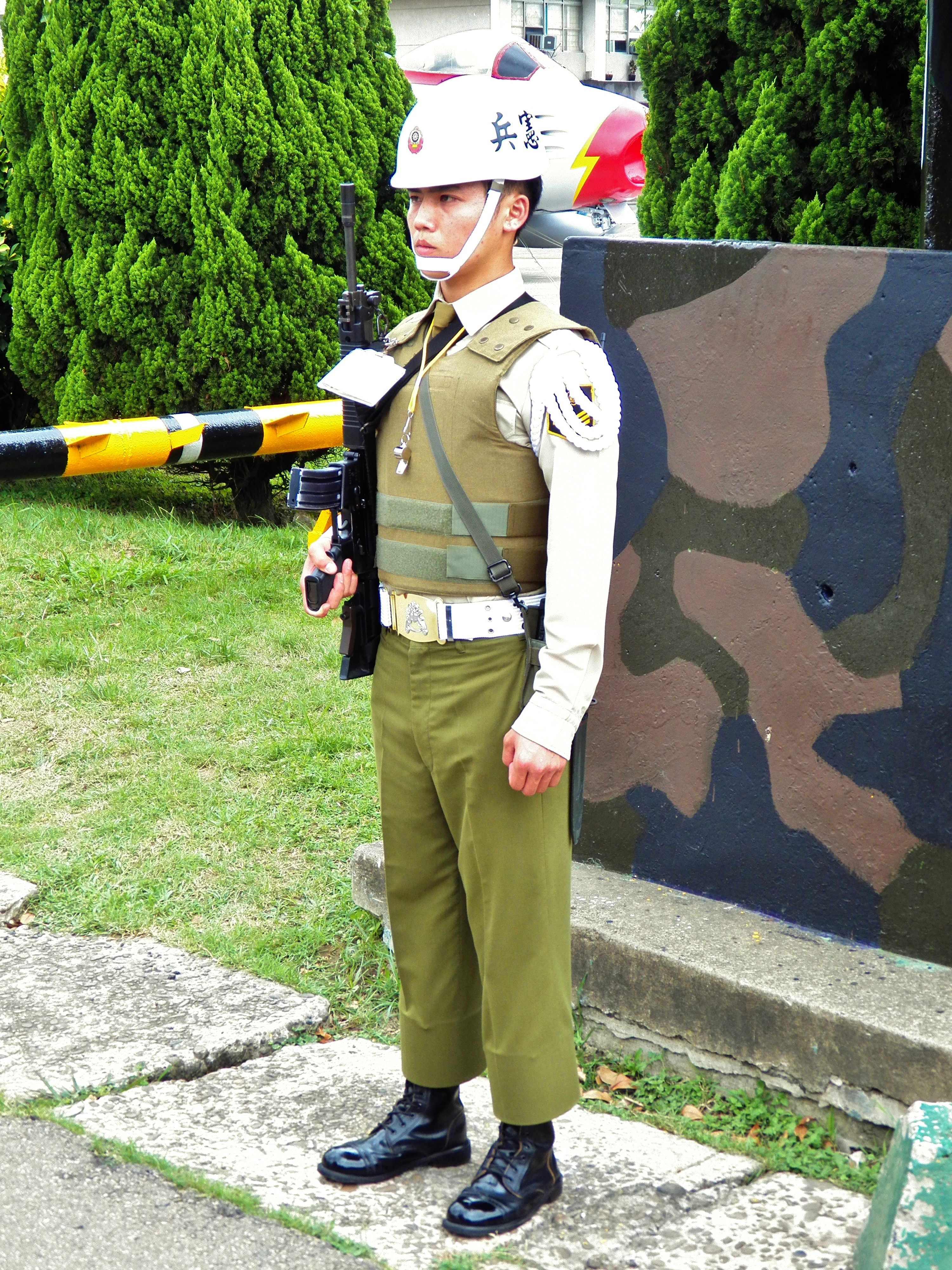 空軍新竹基地卓越大道1號哨崗，着用防彈背心執勤的憲兵。